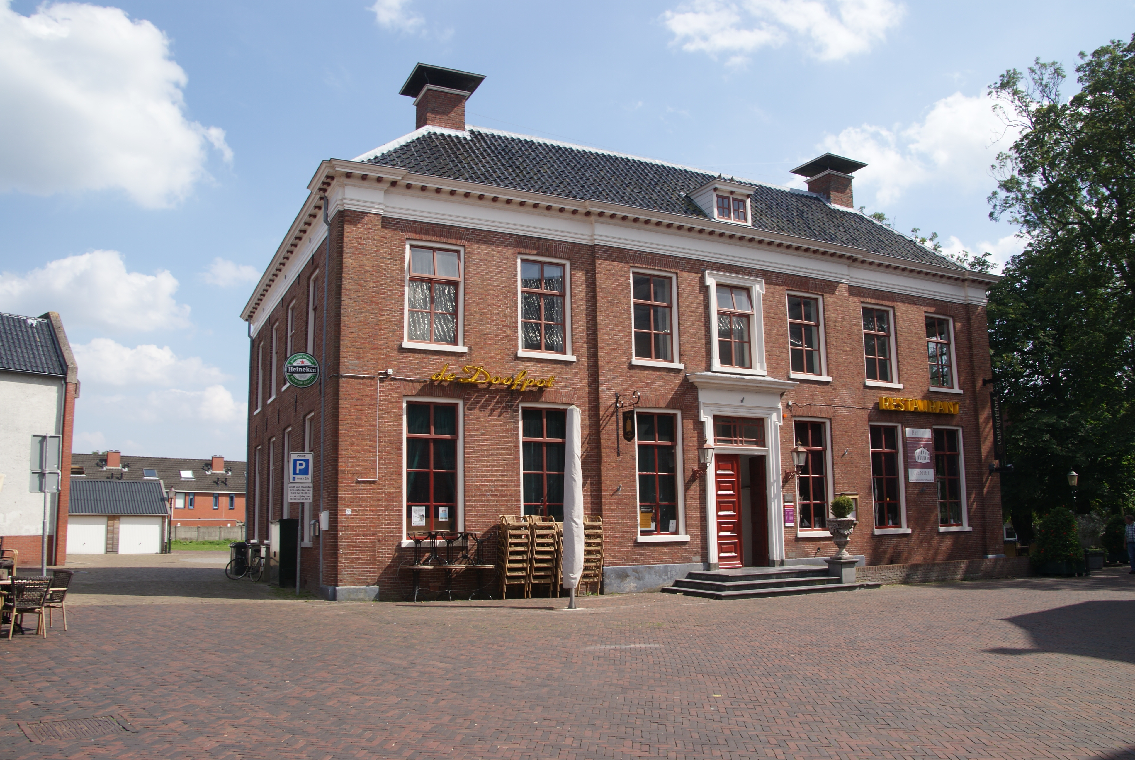 Voormalige Rechtbank Appingedam, thans restaurant "De Doofpot"